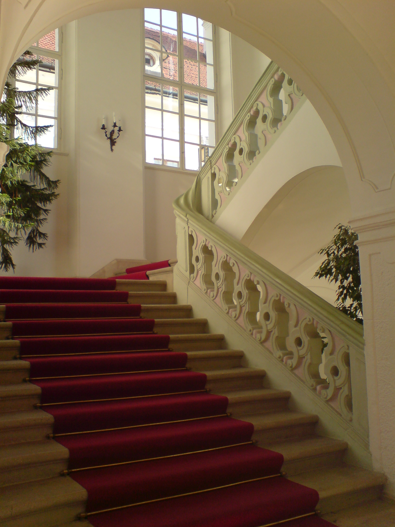 Treppenahaus Gödöllö This is a photo of a monument in Hungary, Identifier: 7051